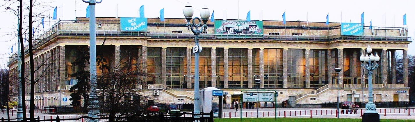 Спортивный комплекс Лужники. Малая спортивная арена